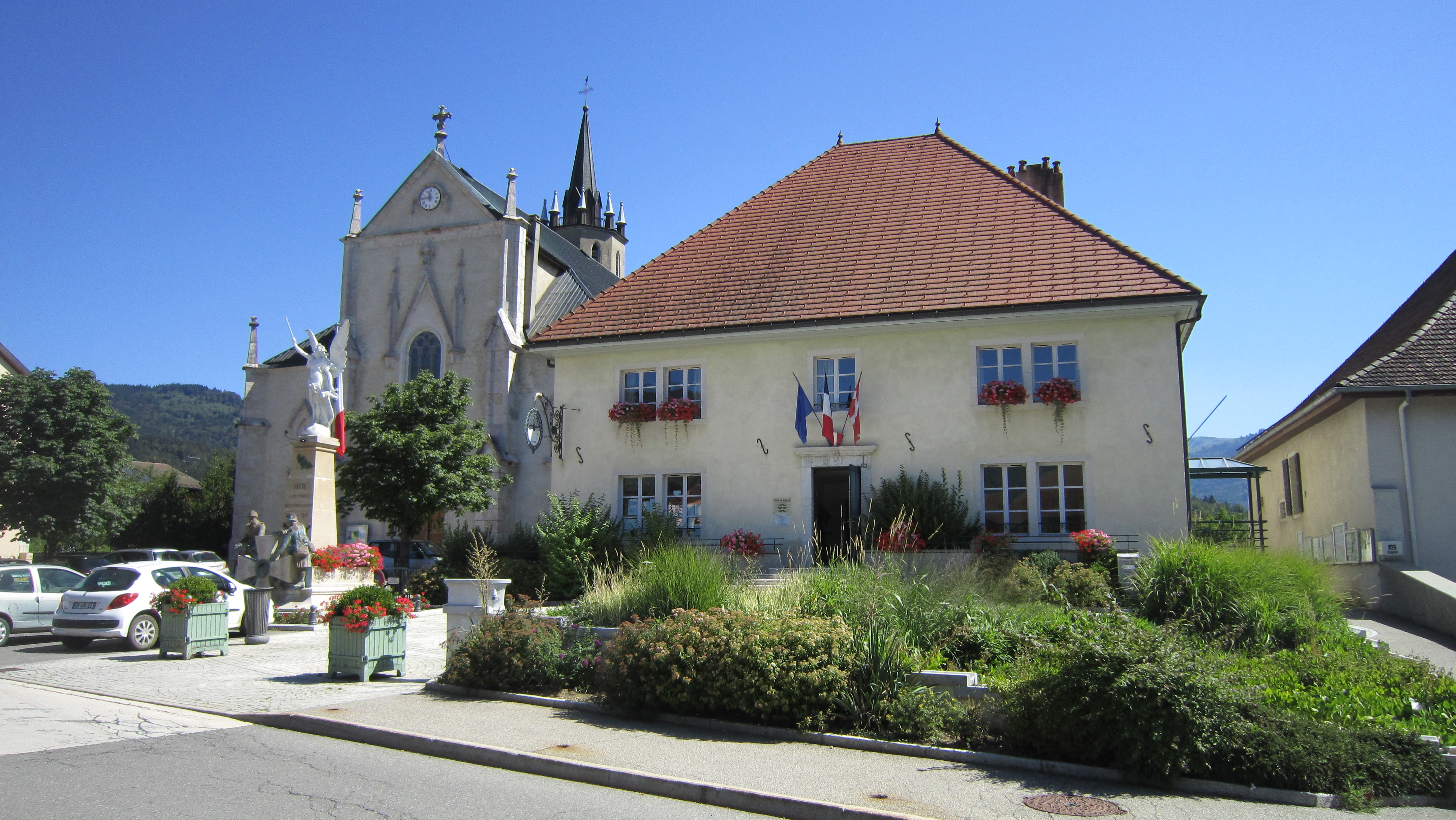 Boêge (Haute-Savoie) : la mairie et l'église